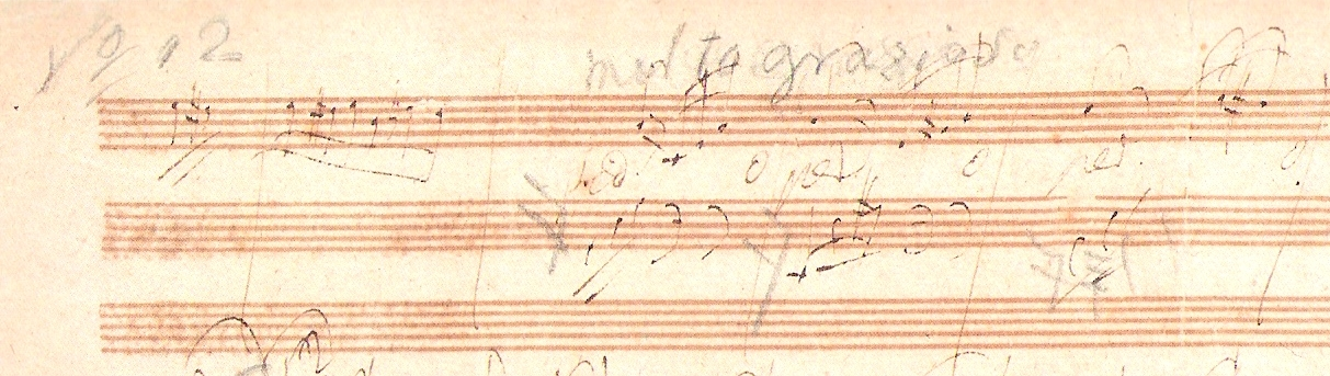 Detail aus BH 116, Skizzen zu WoO 59 ("Für Elise")